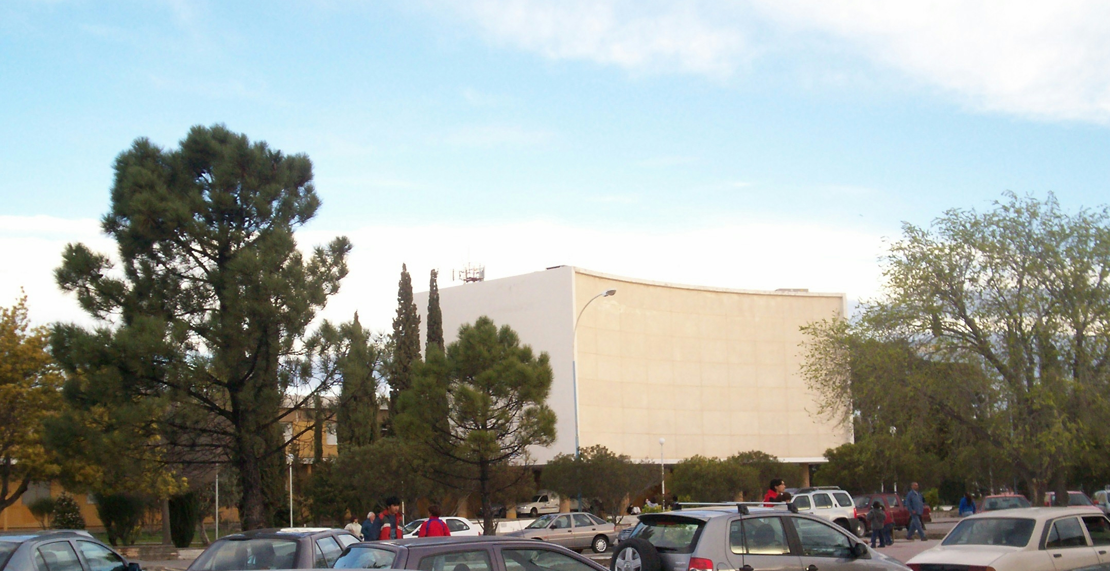 Centro Civico de Rawson - Chubut - Argentina - Legislatura